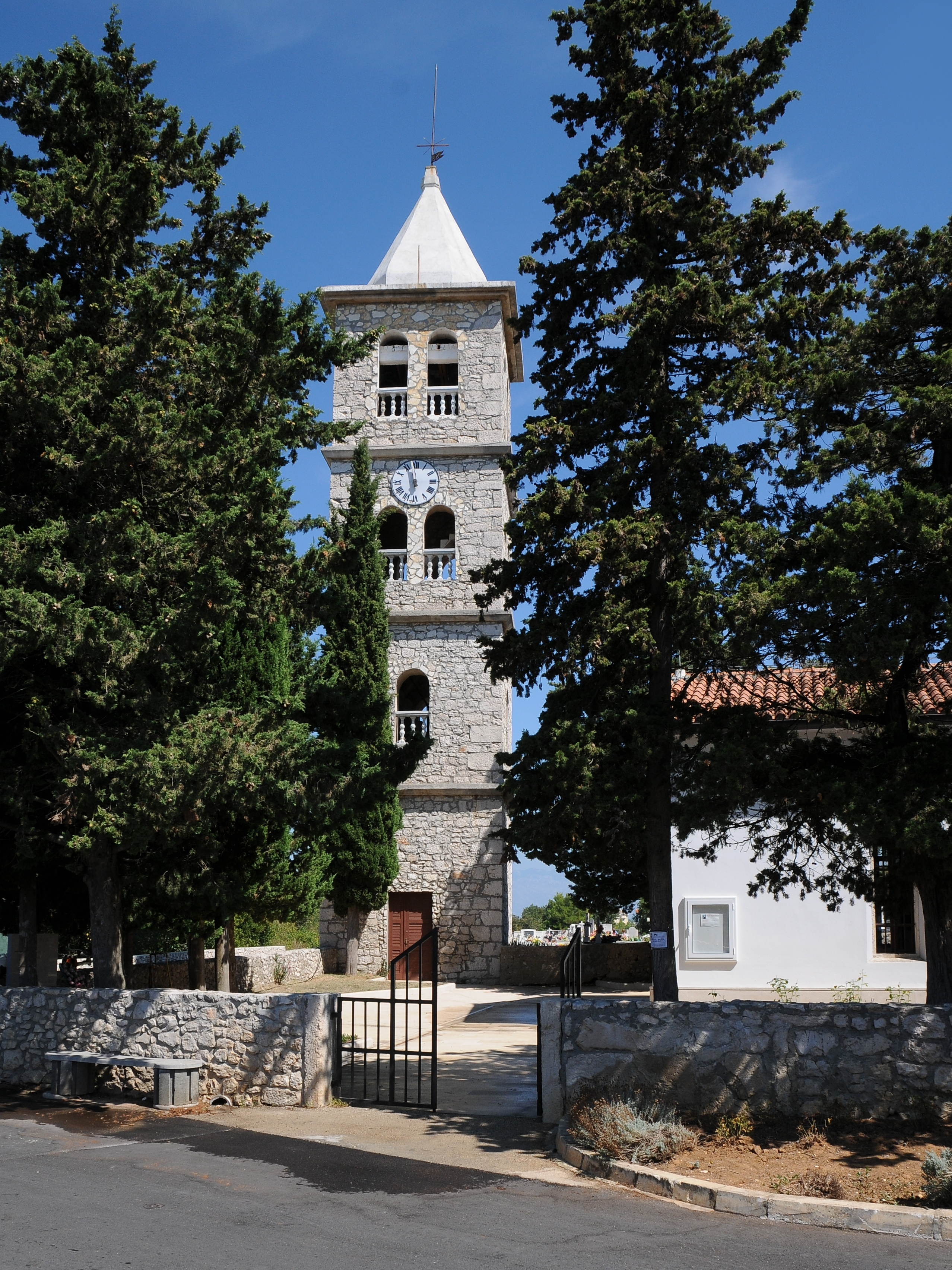 Kirche in Zaton, einem Ort ca. 12km nördlich von Zadar.